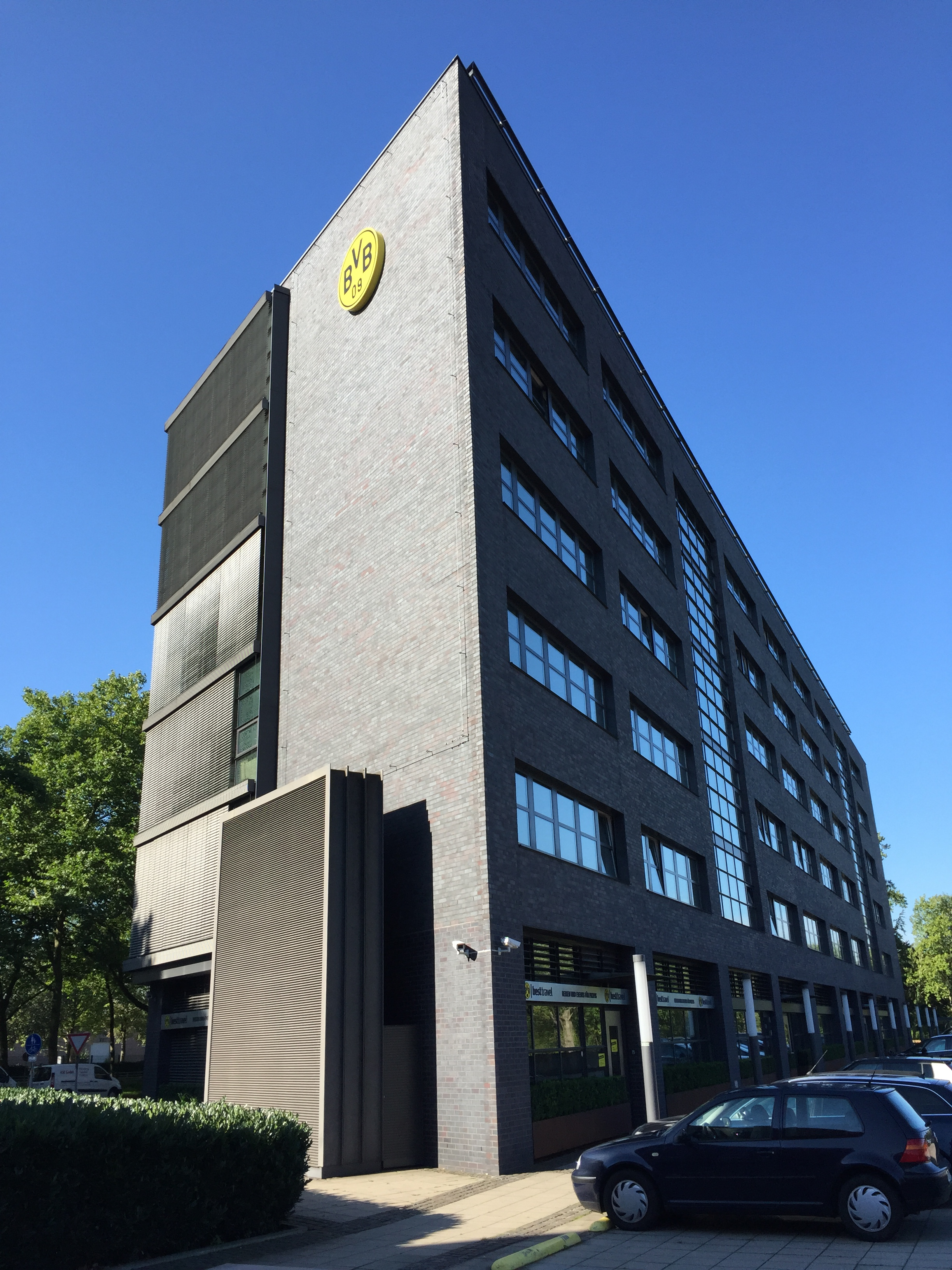 Geschäftsstelle Borussia Dortmund am Rheinlanddamm